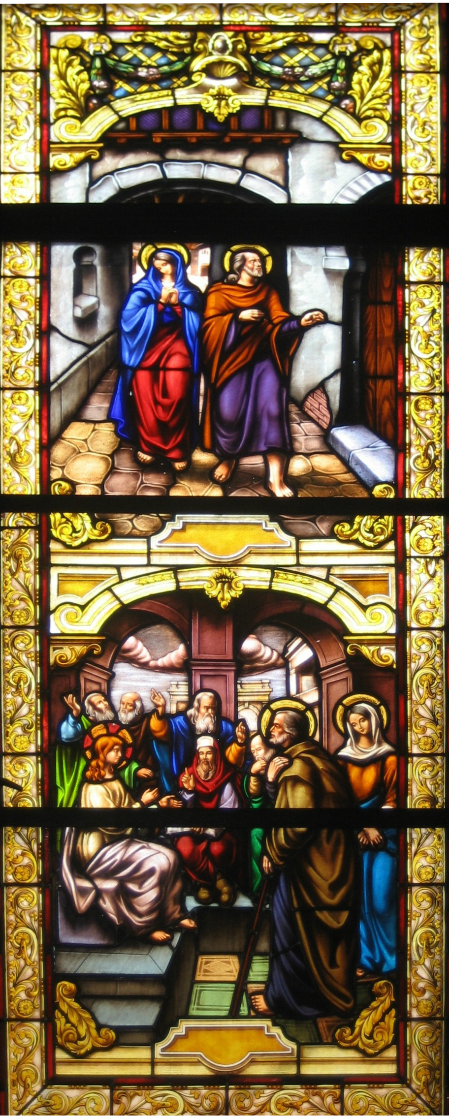 Cuba, Parroquia de San José de Jatibonico: 7-Vitral del Niño Pérdido y Hallado en el Templo.